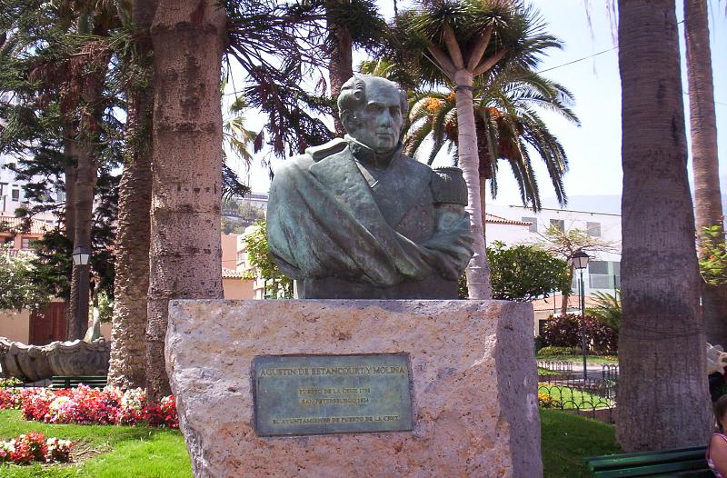 Estatua de Agustin Betancourt en Puerto de la Cruz, Tenerife, Canarias